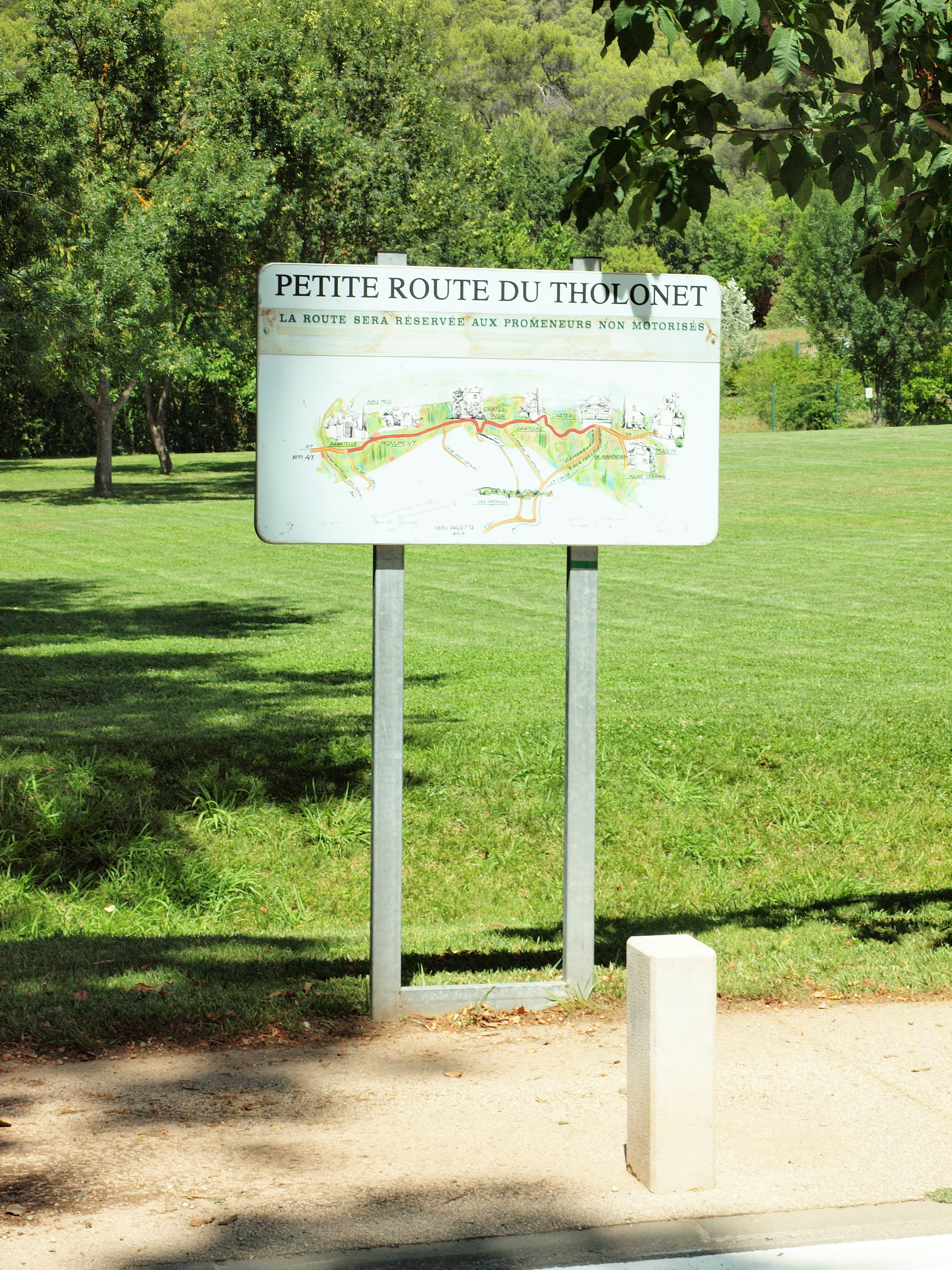 Le Tholonet (Bouches du Rhône, France)